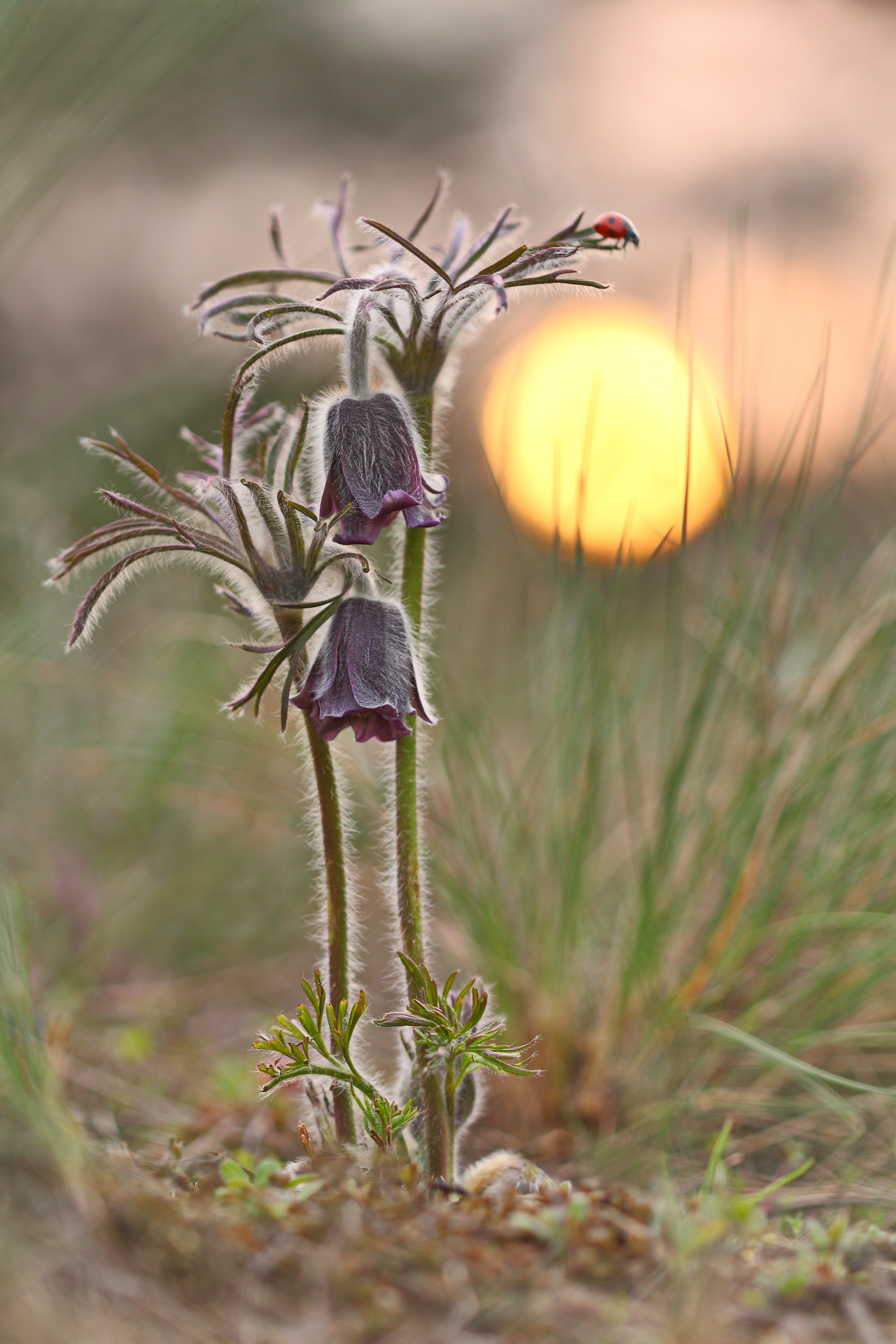 Місце зйомки: Дніпровсько-Орільський природний заповідник. Об'єкт зйомки: Сон лучний - Pulsatilla pratensis (L.) Mill., 1753